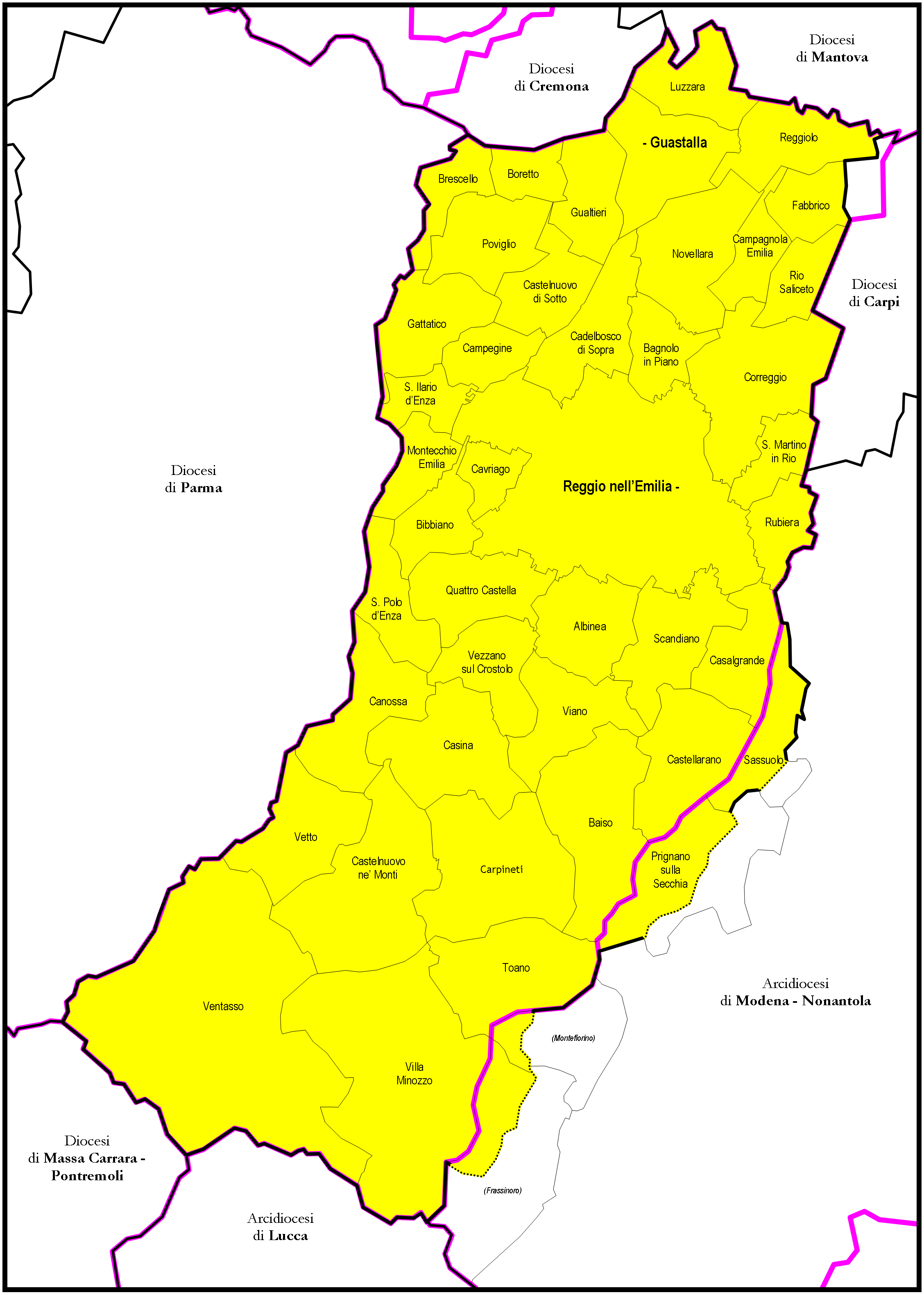 Mappa della Diocesi di Reggio Emilia Guastalla